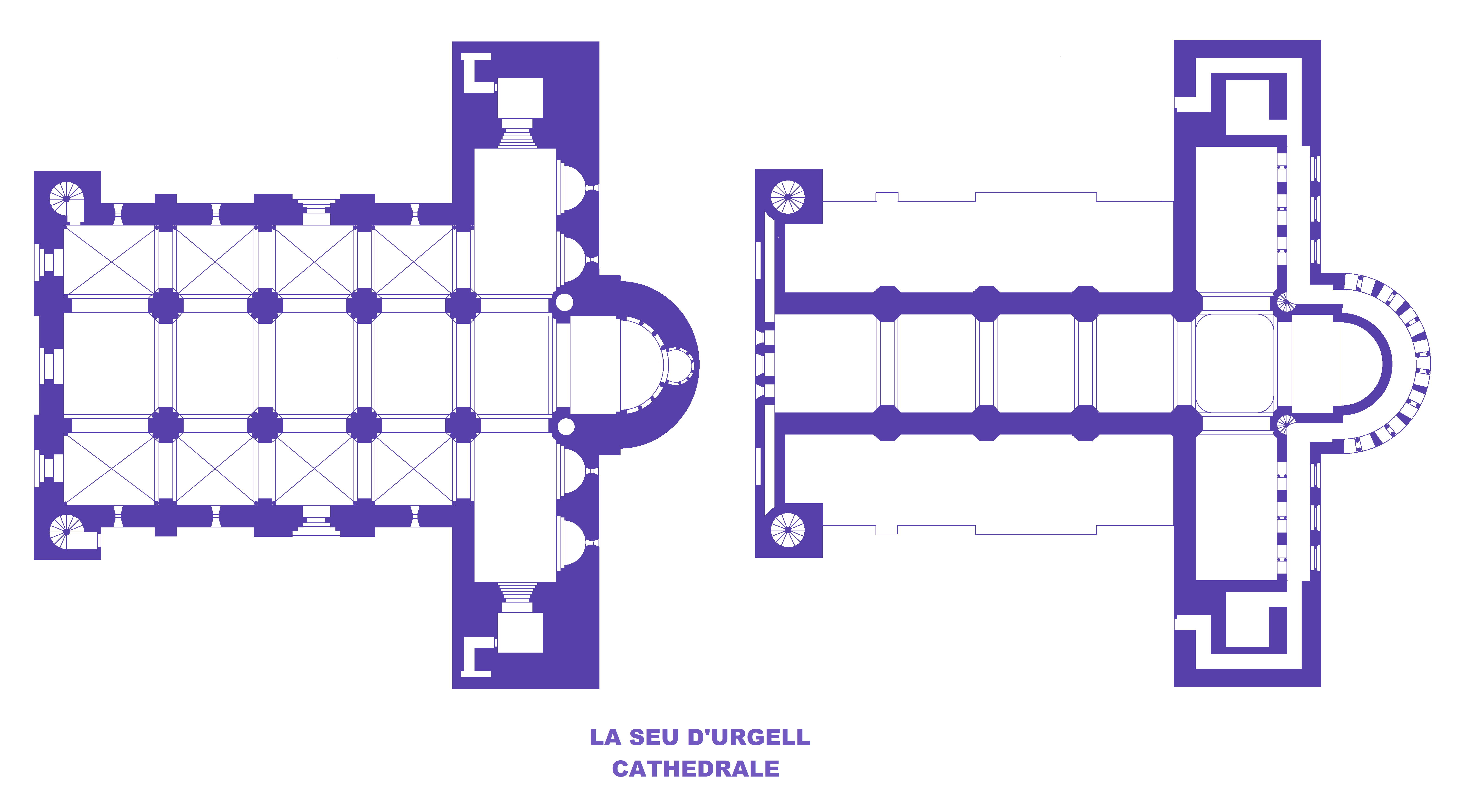 La Seu cathédrale d'Urgell, Plan